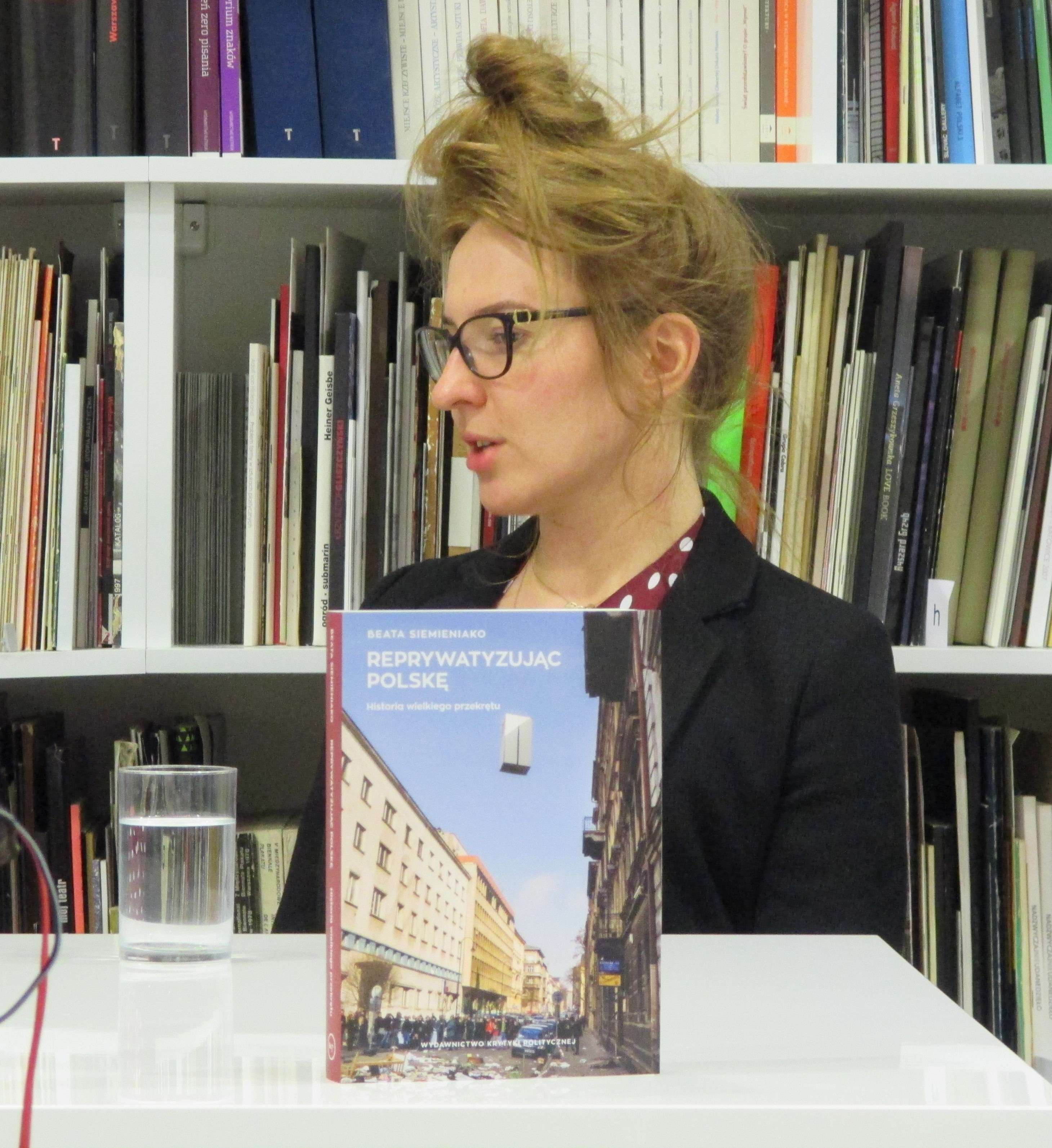 Beata Siemieniako podczas prezentacji książki Reprywatyzując Polskę. Historia wielkiego przekrętu.